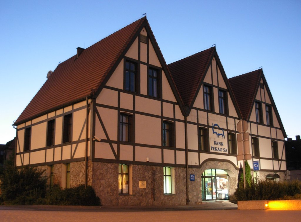 Budynki Banku BPH w Bydgoszczy